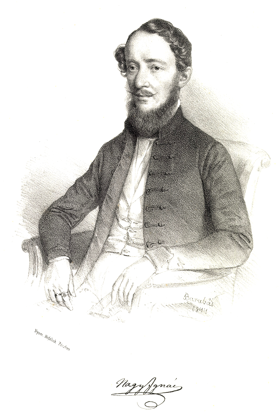 Nagy Ignác (1810-1854) író, szerkesztő litográfia portré